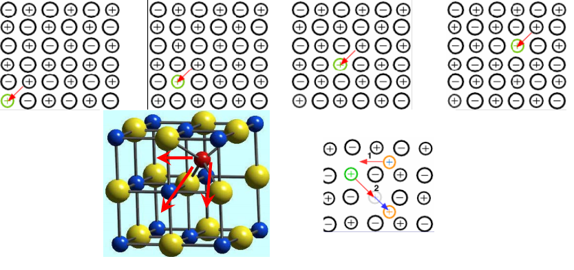 Schottky-en eta Frenkel-en akatsengatik sortutako eroankortasuna